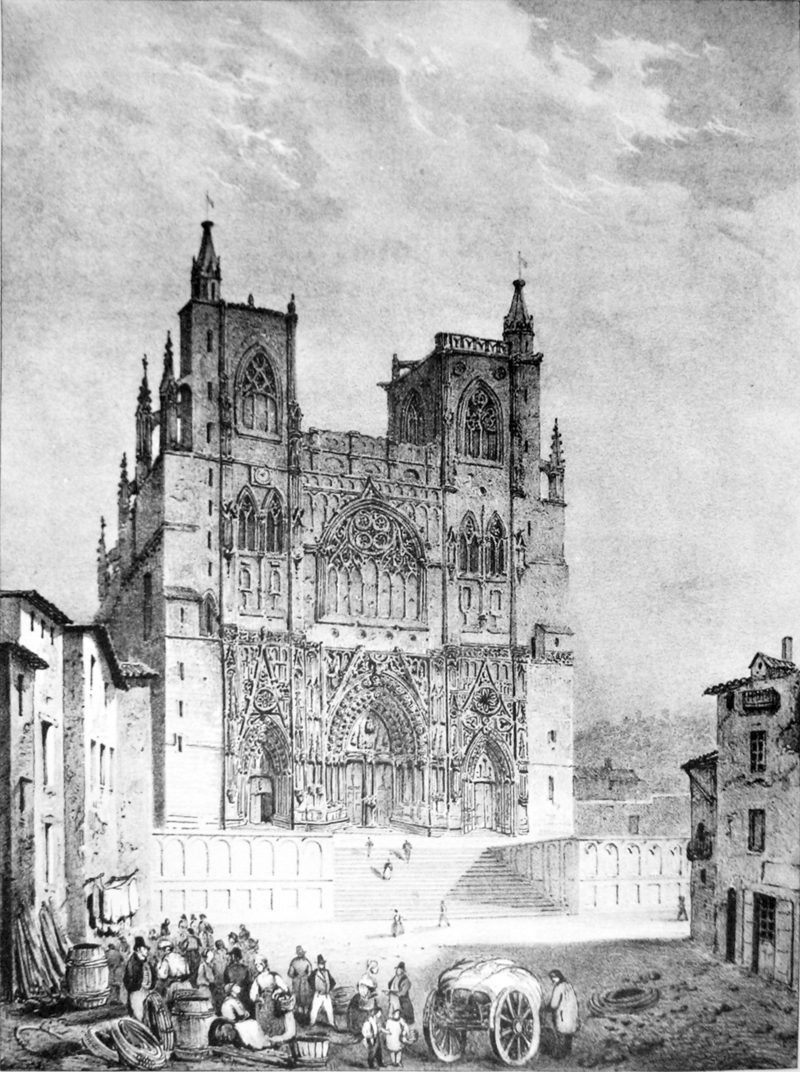 St Maurice à Vienne (Isère) ATTENTION ! Ce facsimilé est réalisé en applicant des alterations avec un logiciel graphique à une copie numérique, obtenue à partir d'une prise de photo faite par un non-professionnel. Elle pourrait ne pas être parfaitement réussie.